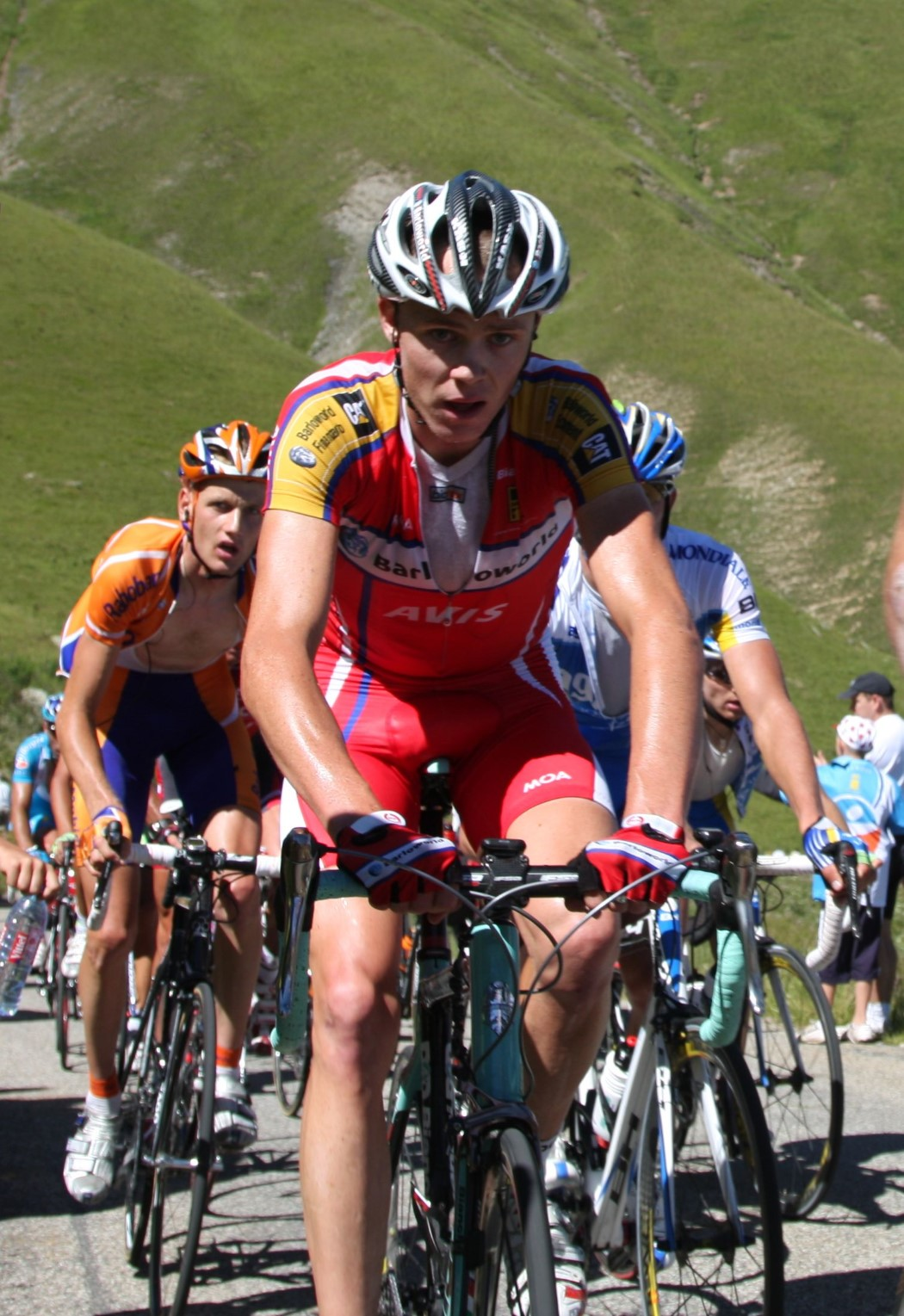 7629 weening froome